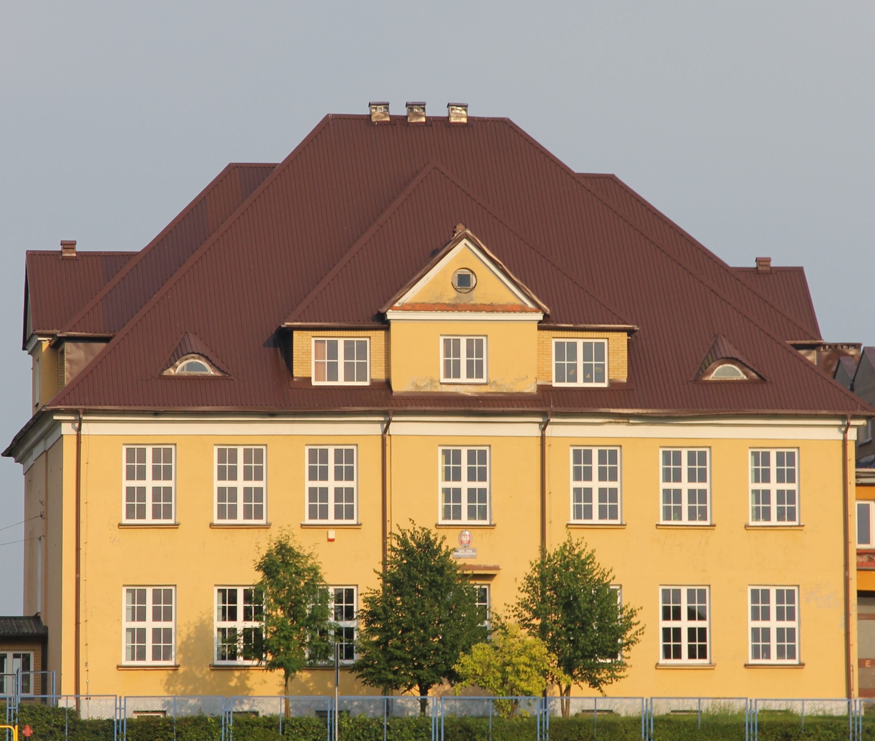 Szkoła podstawowa i gimnazjum